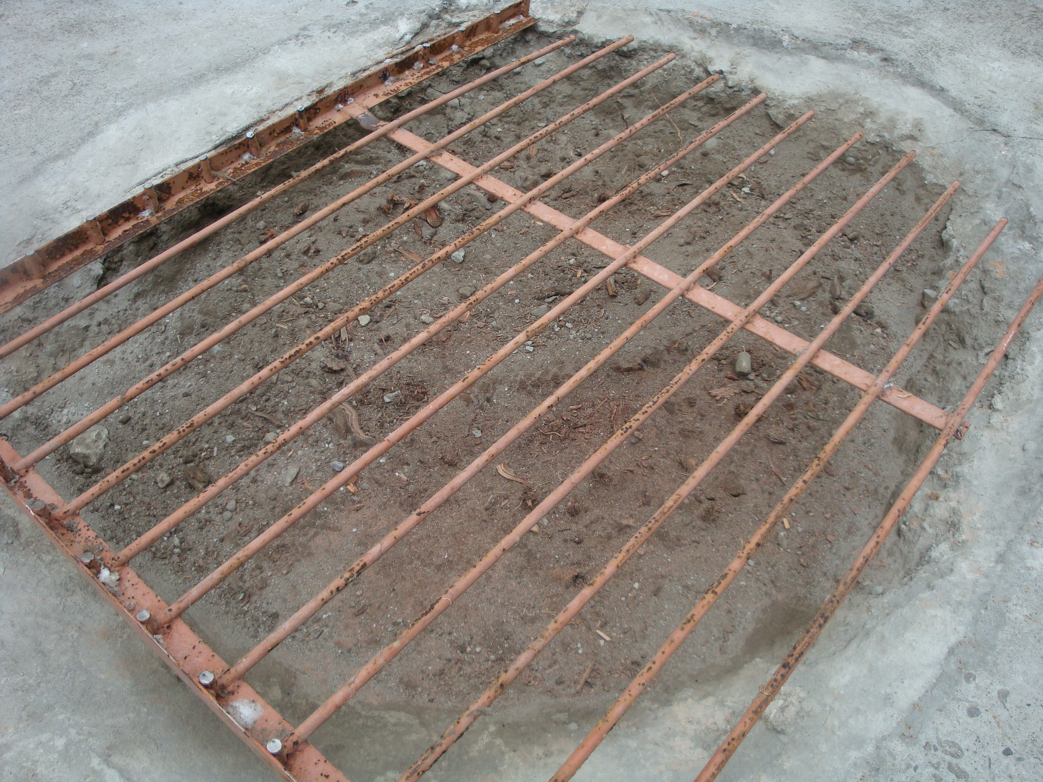 樹根殘幹